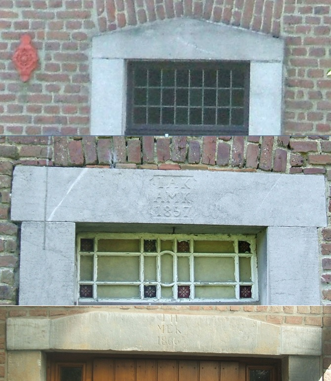 Klassizistische Gewände resp. Laibung an alten Tüschenbroicher Häusern